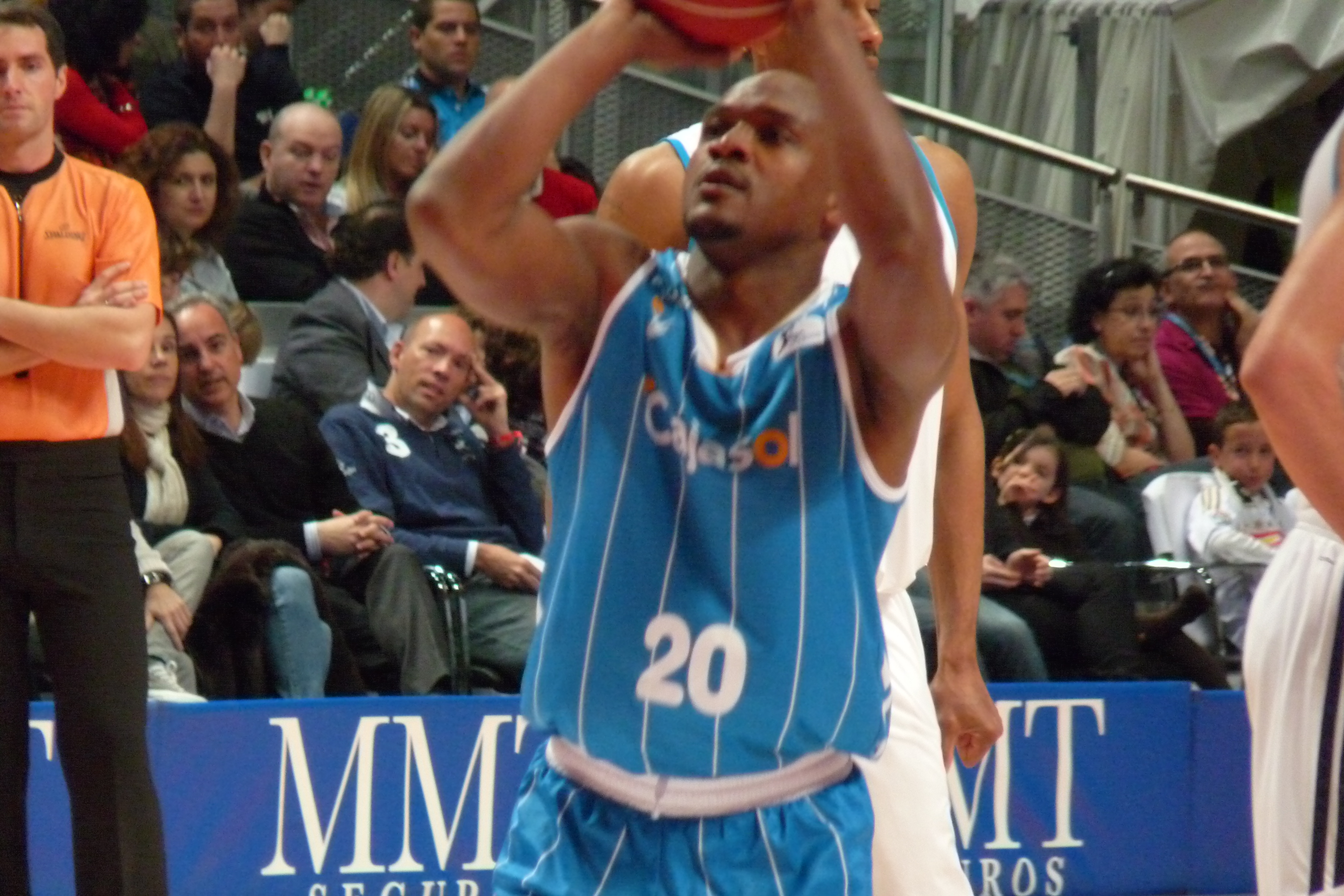 Roderick Blakney